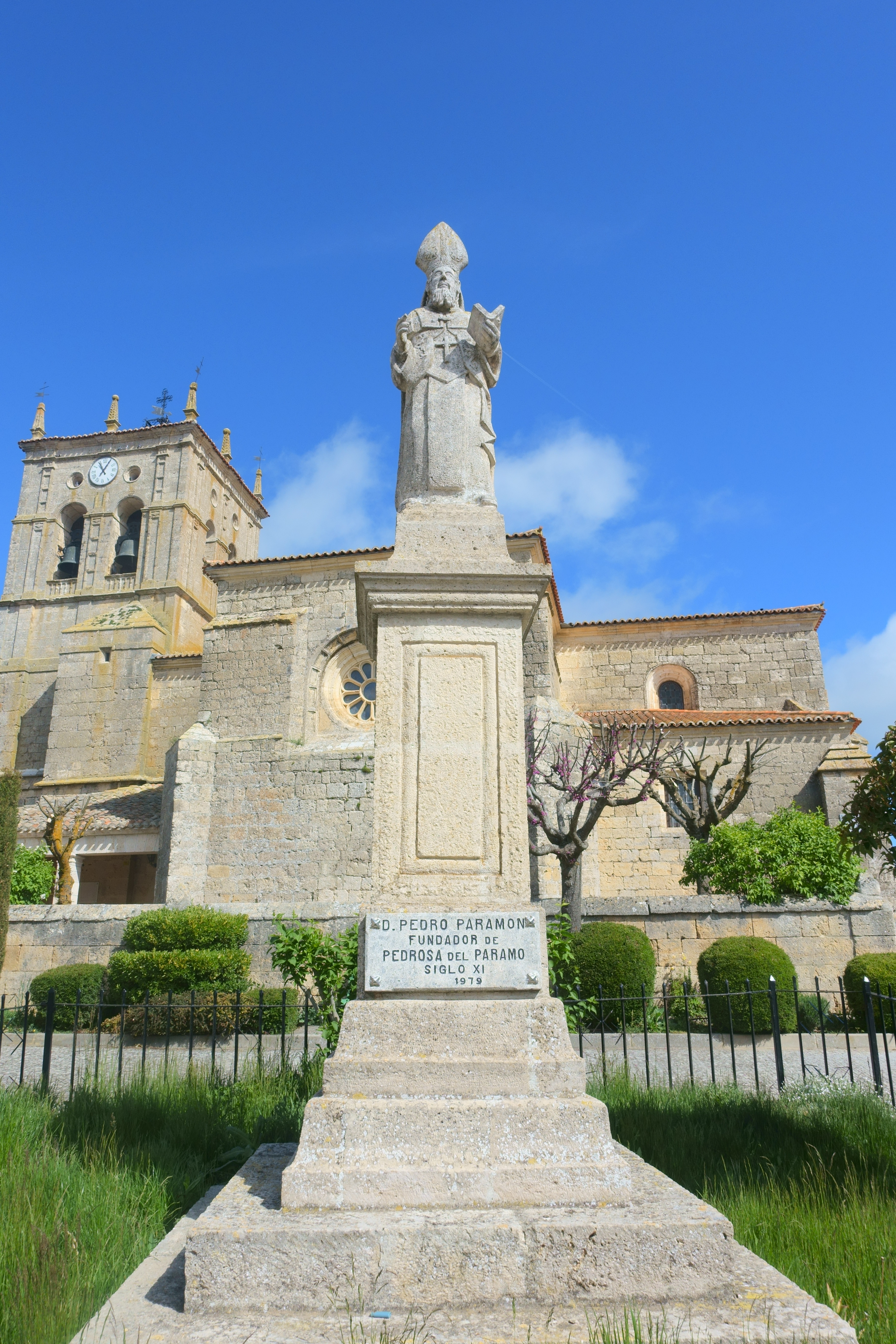 Monumento a Pedro Paramón, en Pedrosa del Páramo (Burgos, España).